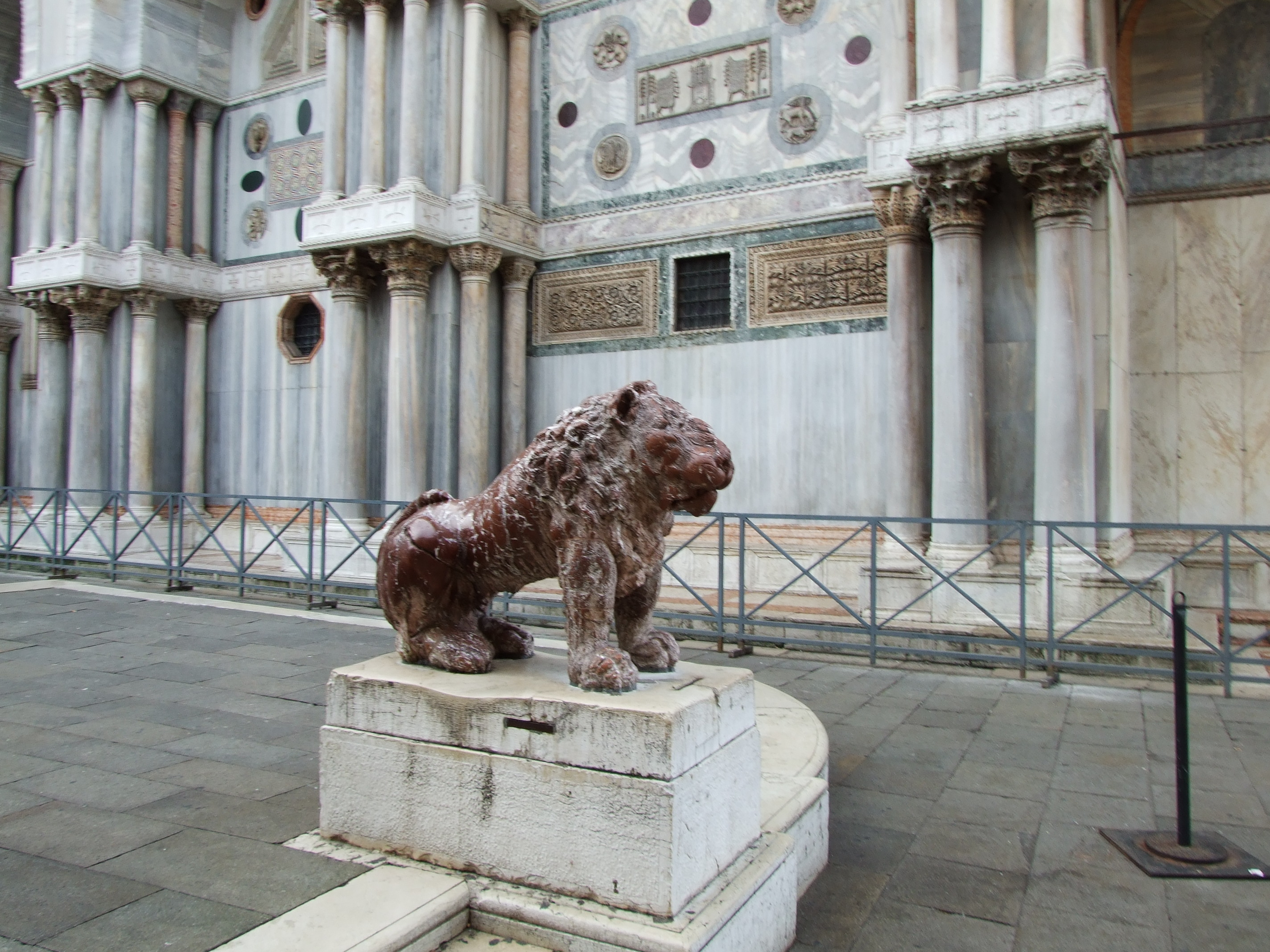 Sant Marc és el patró de Venècia, a qualsevol lloc es poden veure lleons, qualcun porta un llibre que diu: Pax tibi Marce evangelista meus.